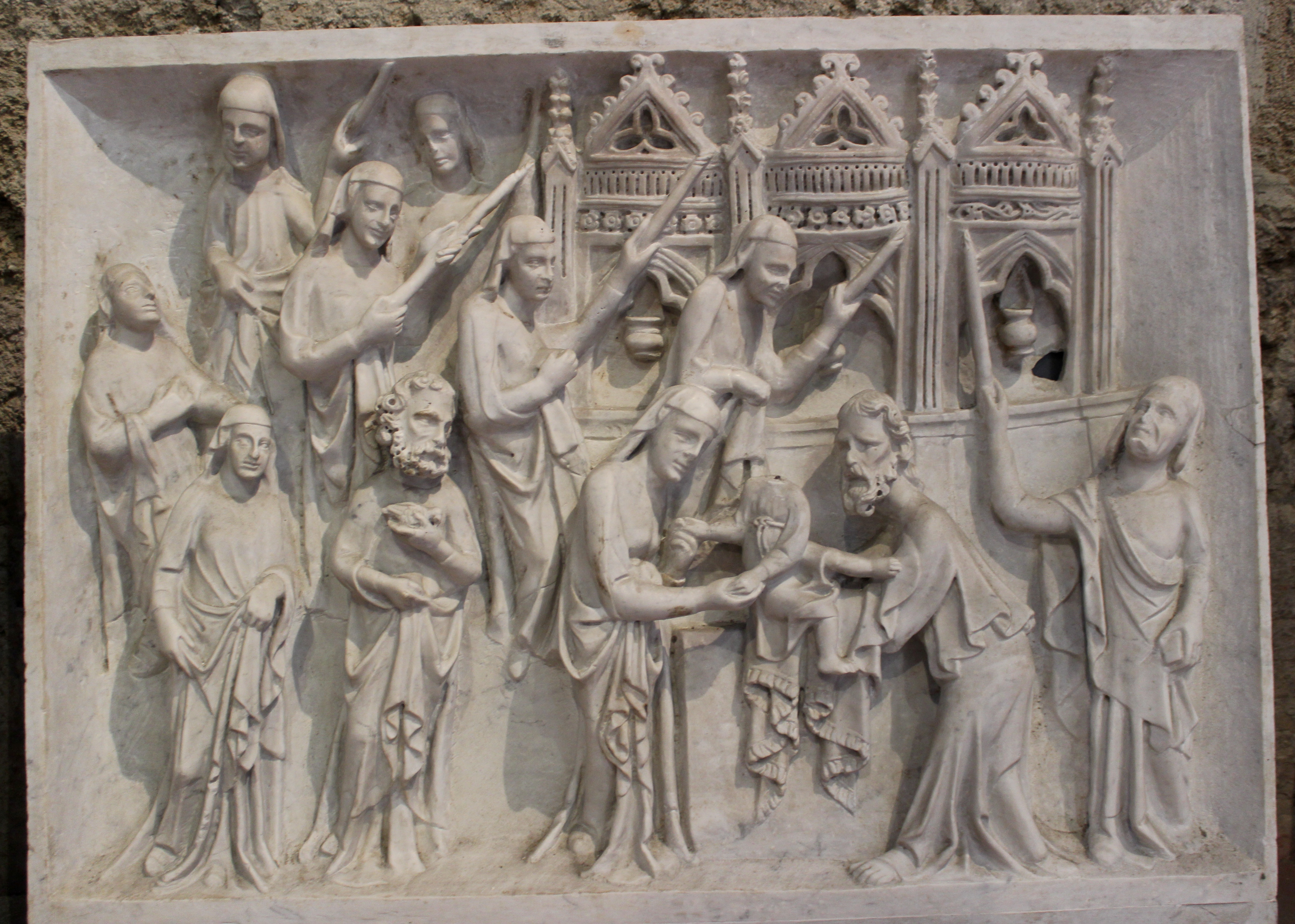 Pisa. Museo Nazionale di San Matteo, relieve del púlpito de San Michele in Borgo.